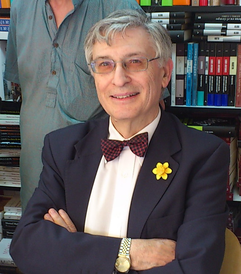 El historiador español Viñas firmando libros en la Feria del Libro de Madrid (edición de 2012)